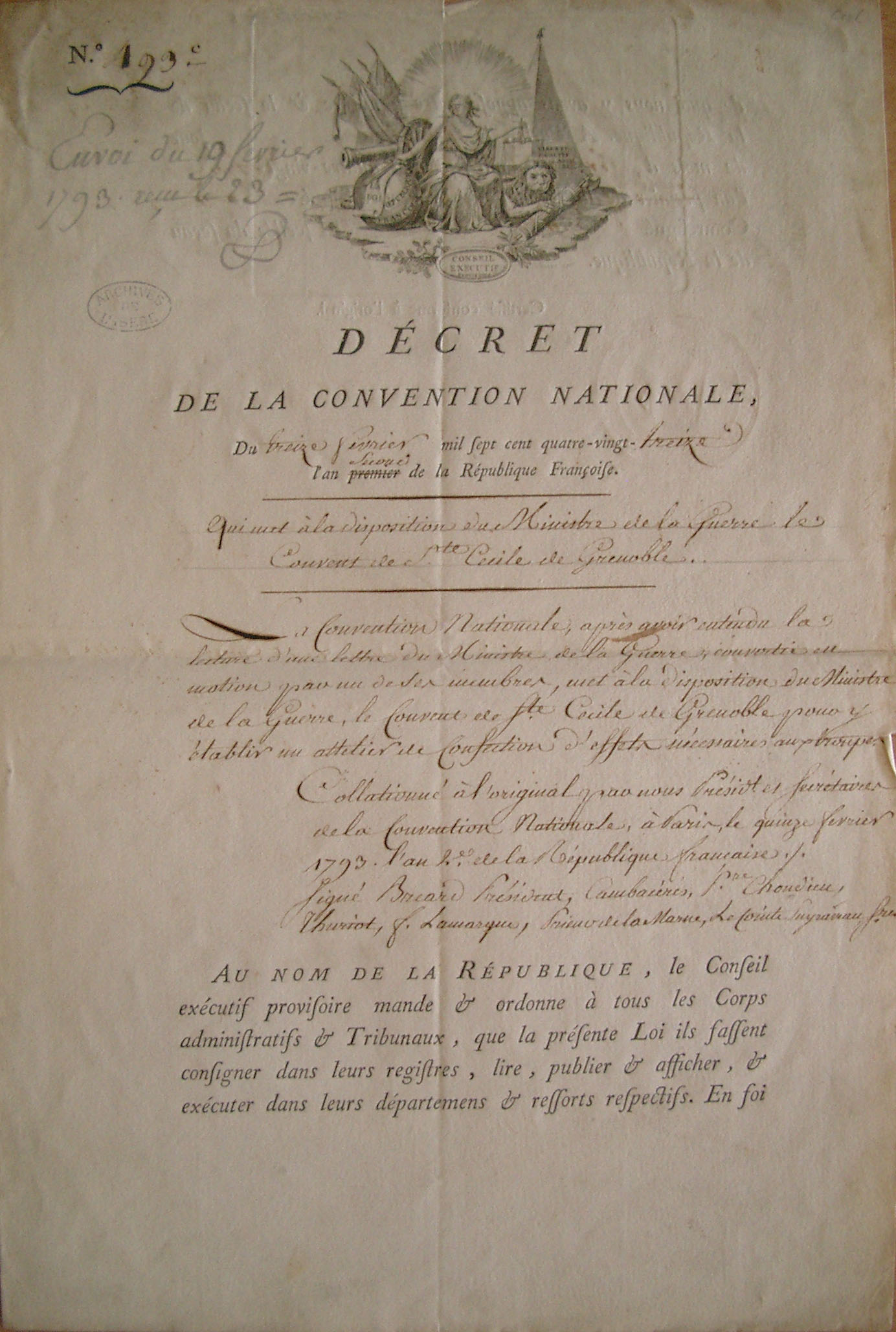 Décret de la convention affectant le couvent Sainte-Cécile à l'armée